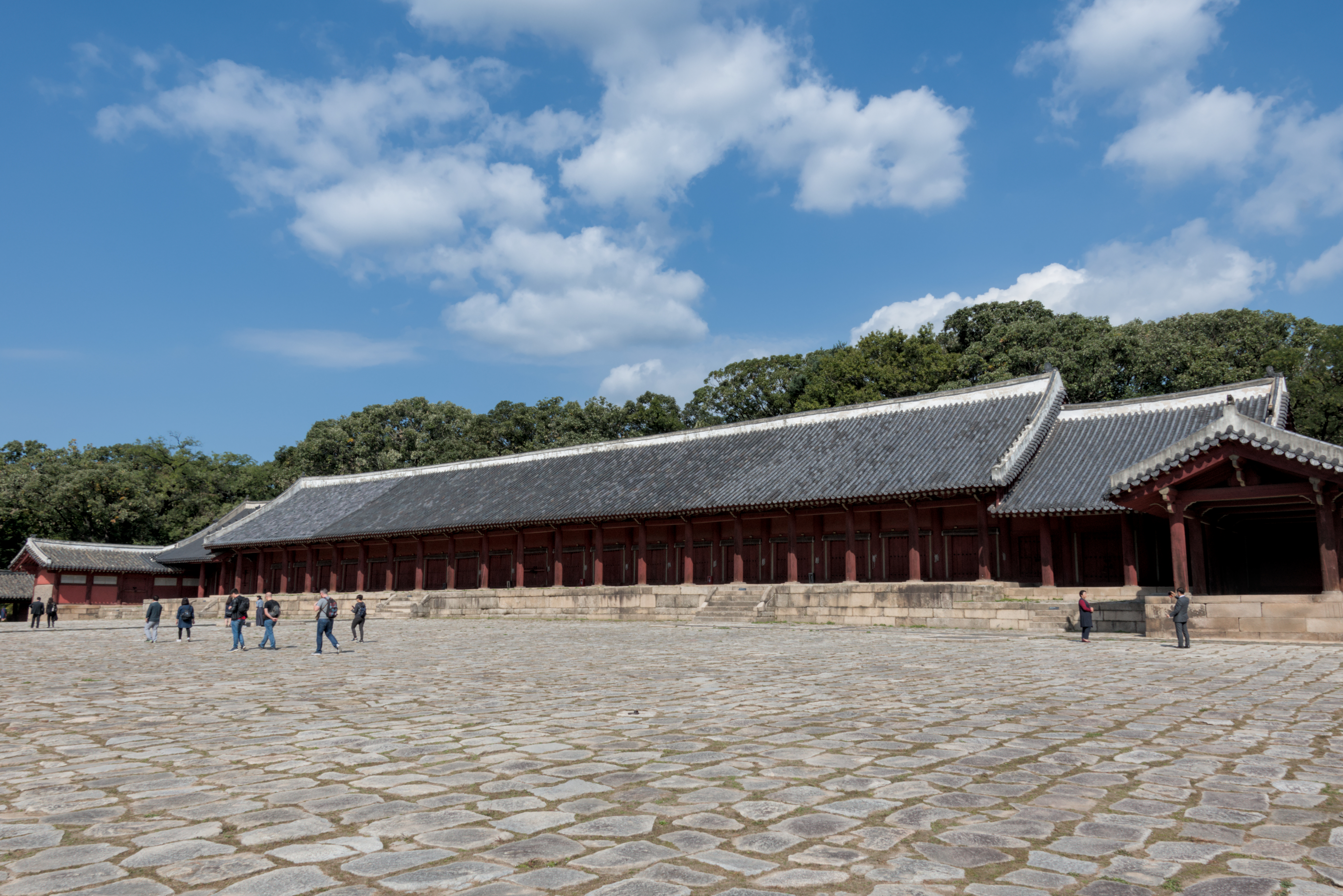 Vue générale de la halle principale dite « Hall de confort éternel » au Jongmyo